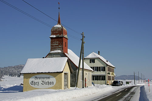 Restaurant "Chez Bichon" Vallée de la Brévine